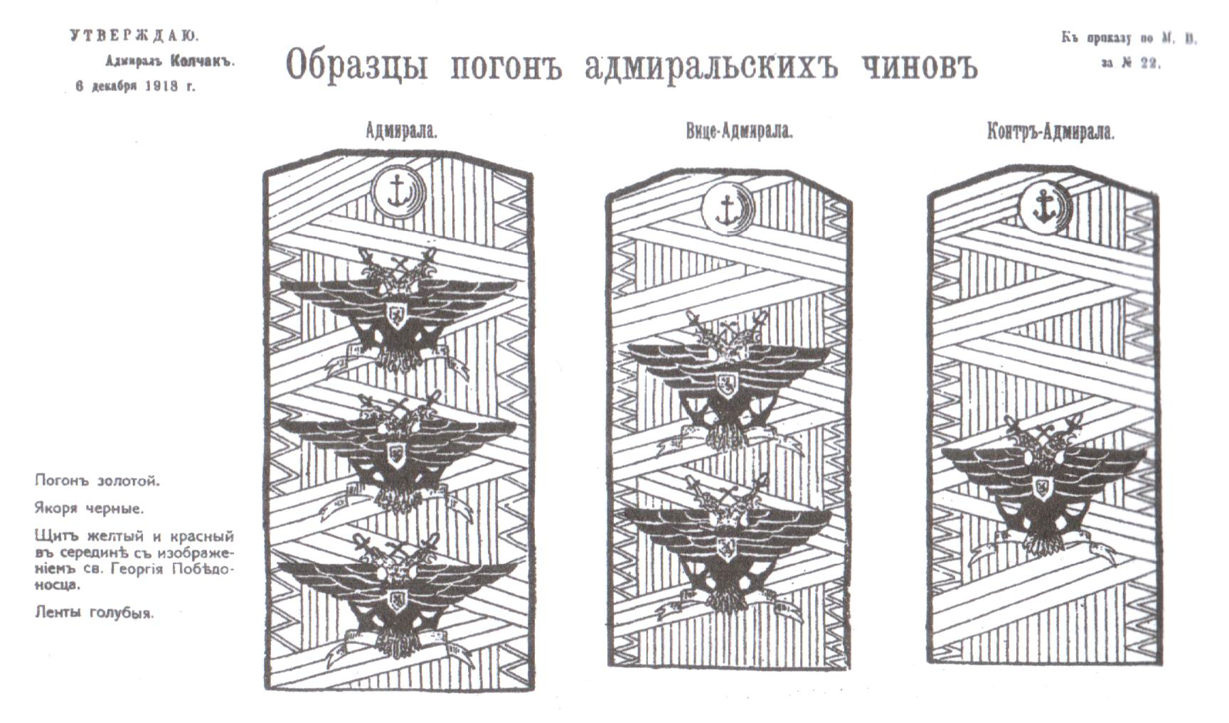 Образцы погонъ адмиральскихъ чиновъ. Образцы погон адмиральских чинов Русской армии адмирала А.В. Колчака